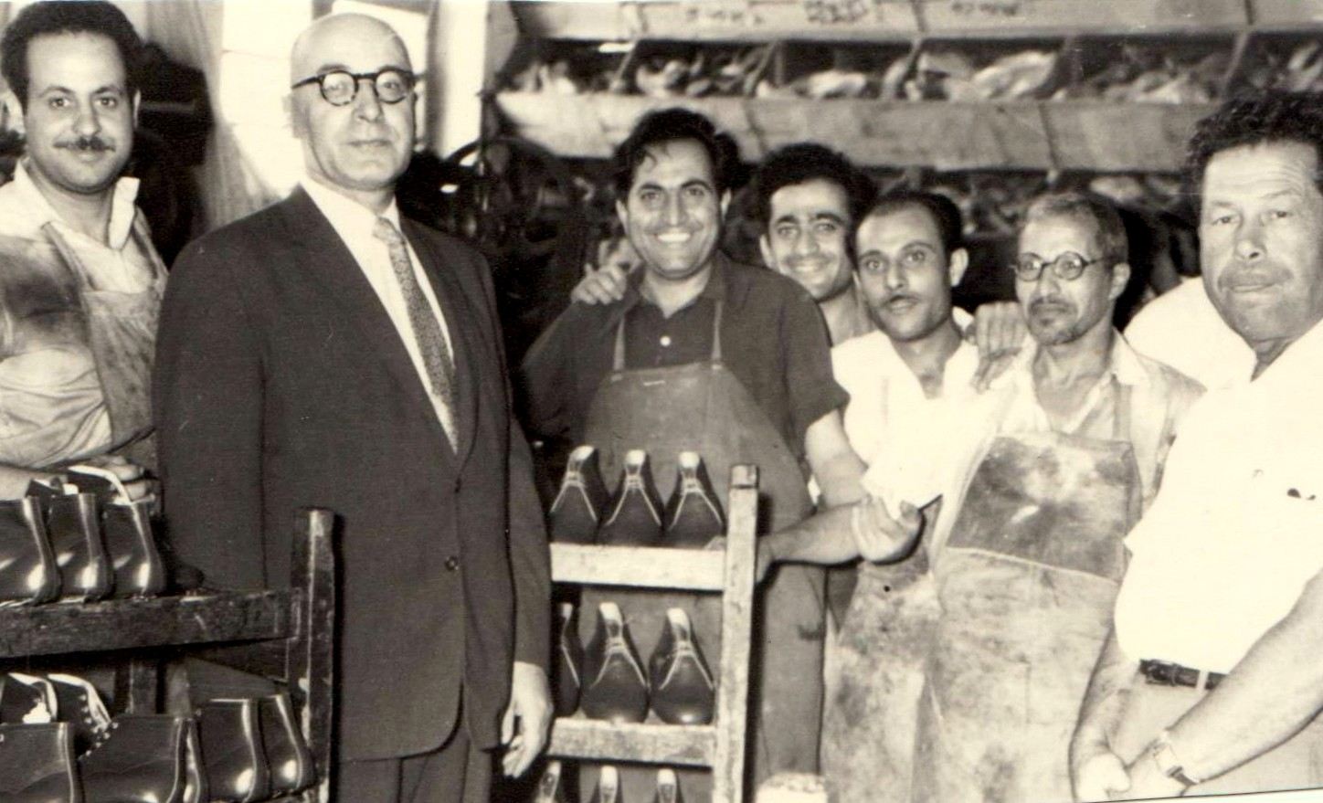 פנחס ספיר מבקר בבית החרושת לנעליים "נעלי ארצנו" בירושלים